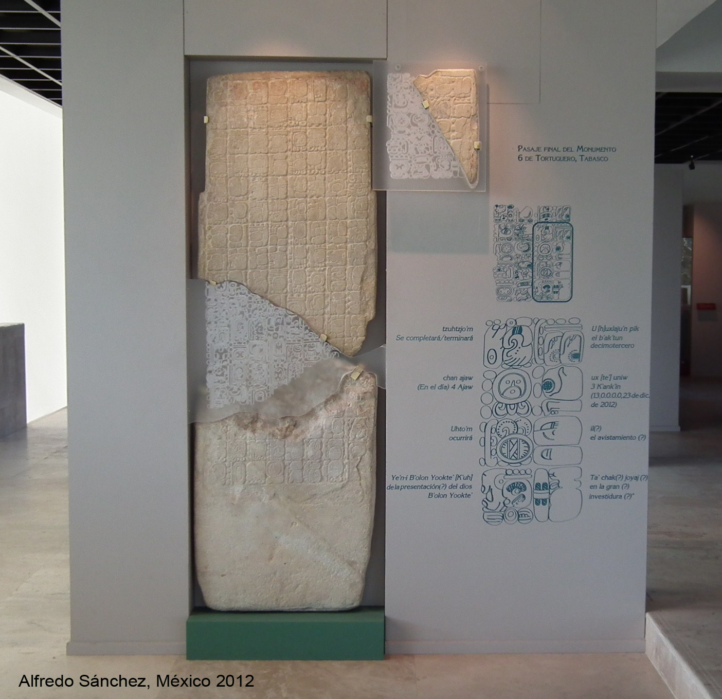 Estela de Tortuguero, Museo Regional de Antropología Carlos Pellicer Cámara, Villahermosa, Tabasco, México, 2012. Esta estela tiere relevancia mundial, porque predice el fin de una era del calendario maya de 5.125 años, 13 baktunes, esto es, el 21 de diciembre del 2012.